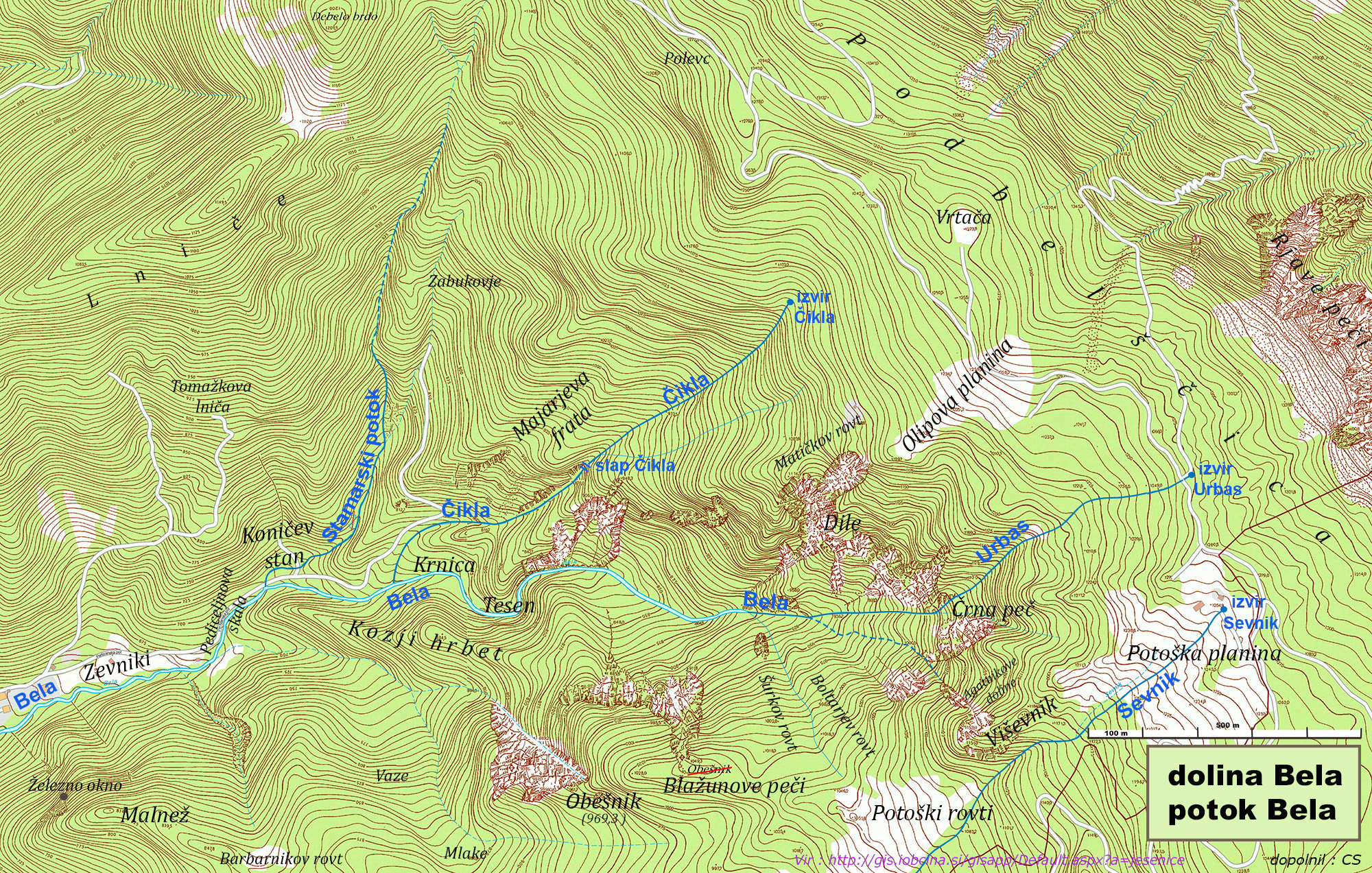 Bela - dolina in potok